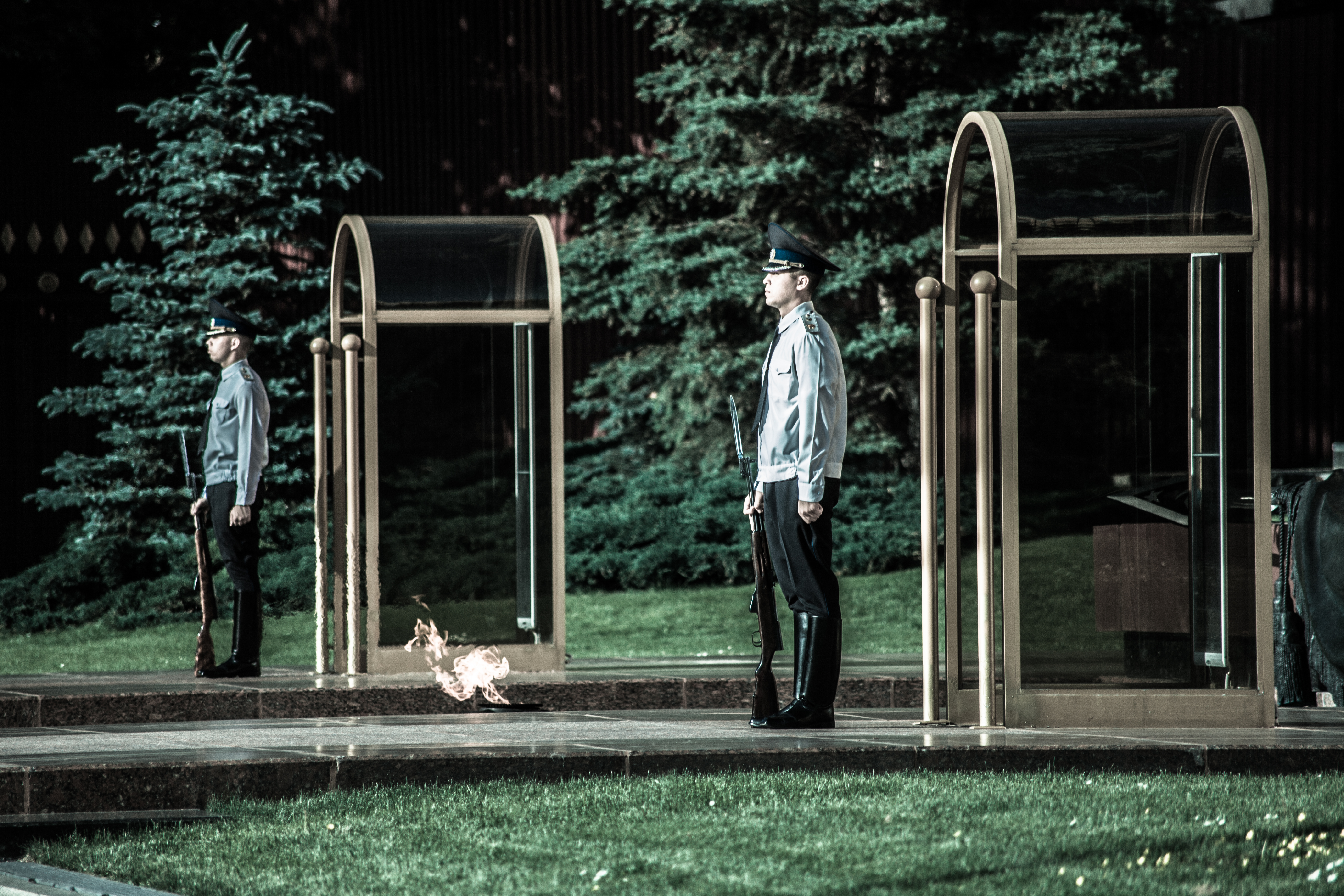 Моги́ла Неизве́стного Солда́та